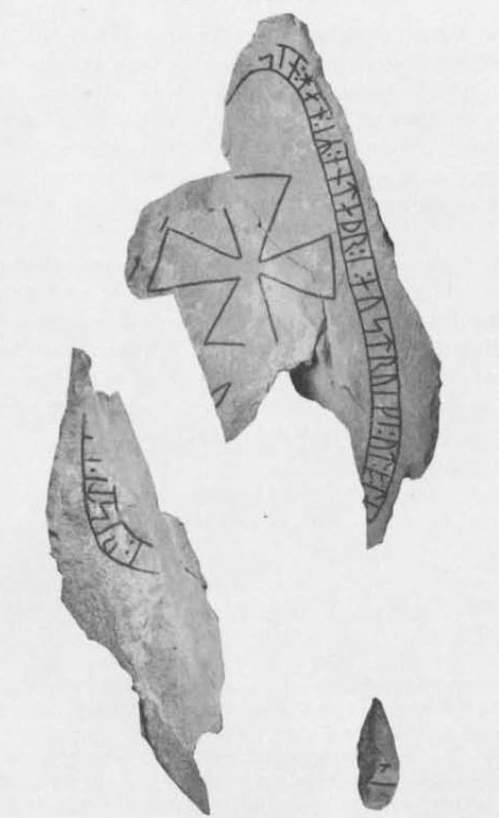 Runestone picture